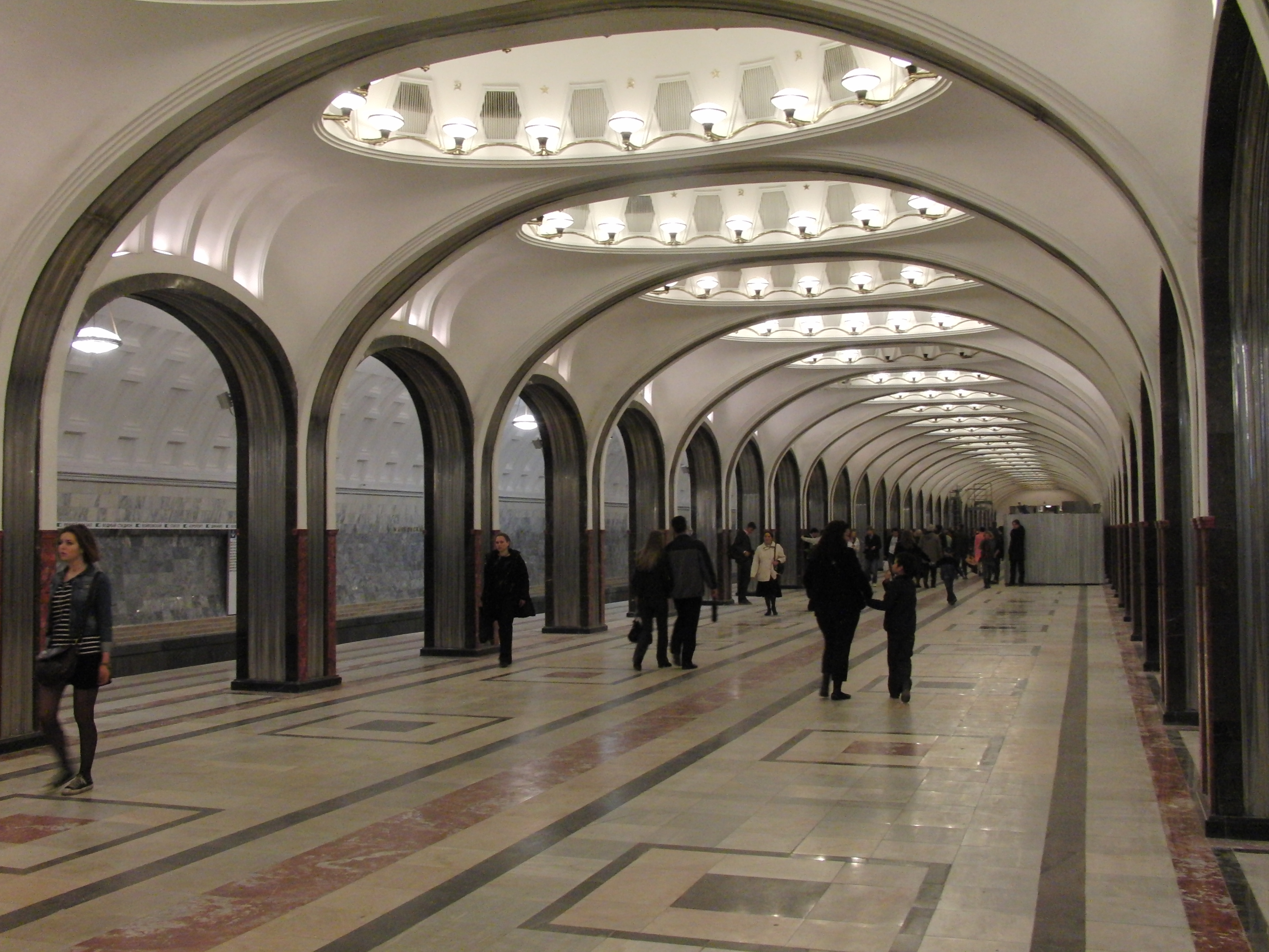 Mayakovskaya (Маяковская)